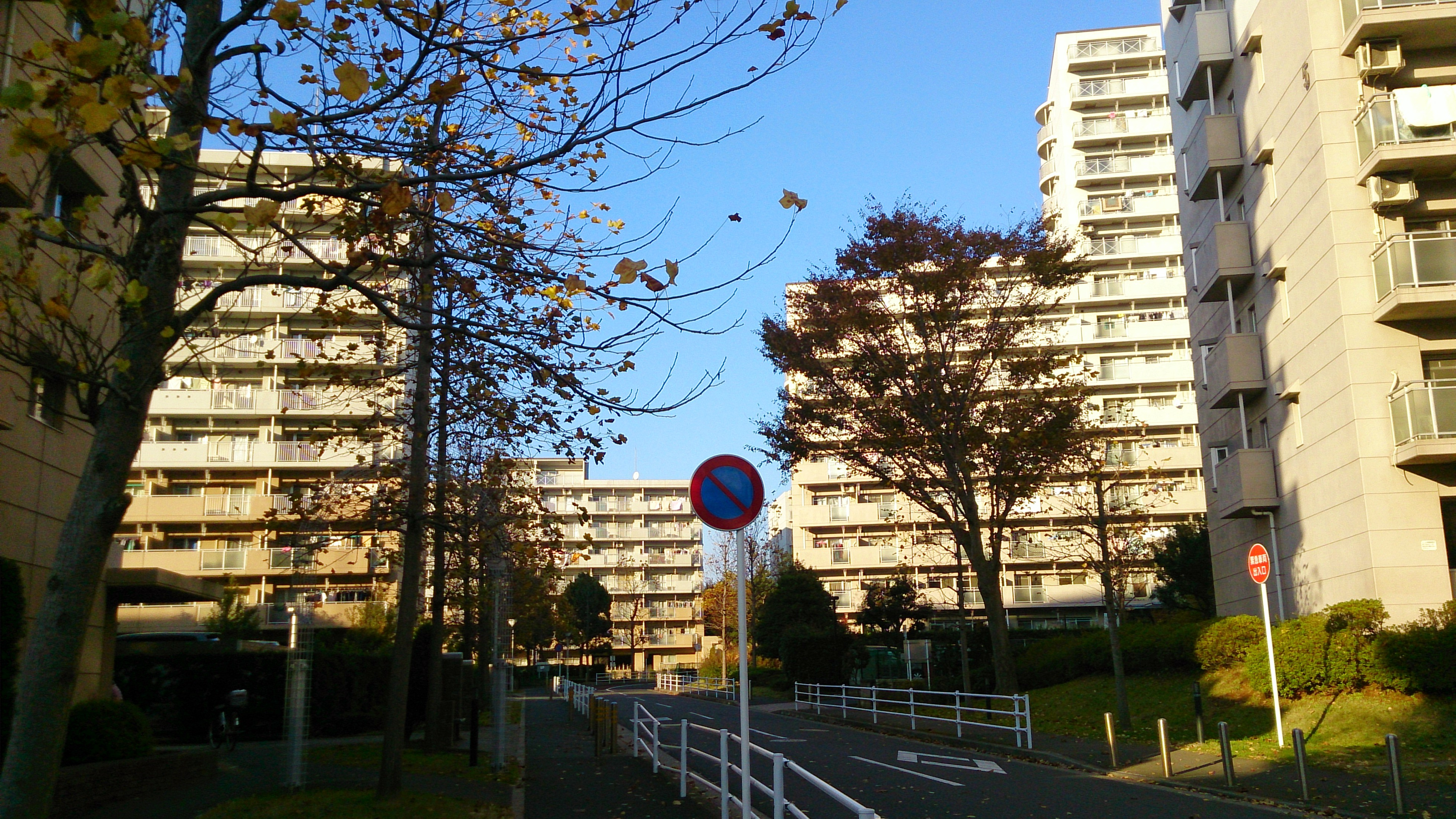 八千代ゆりのき台パークシティ